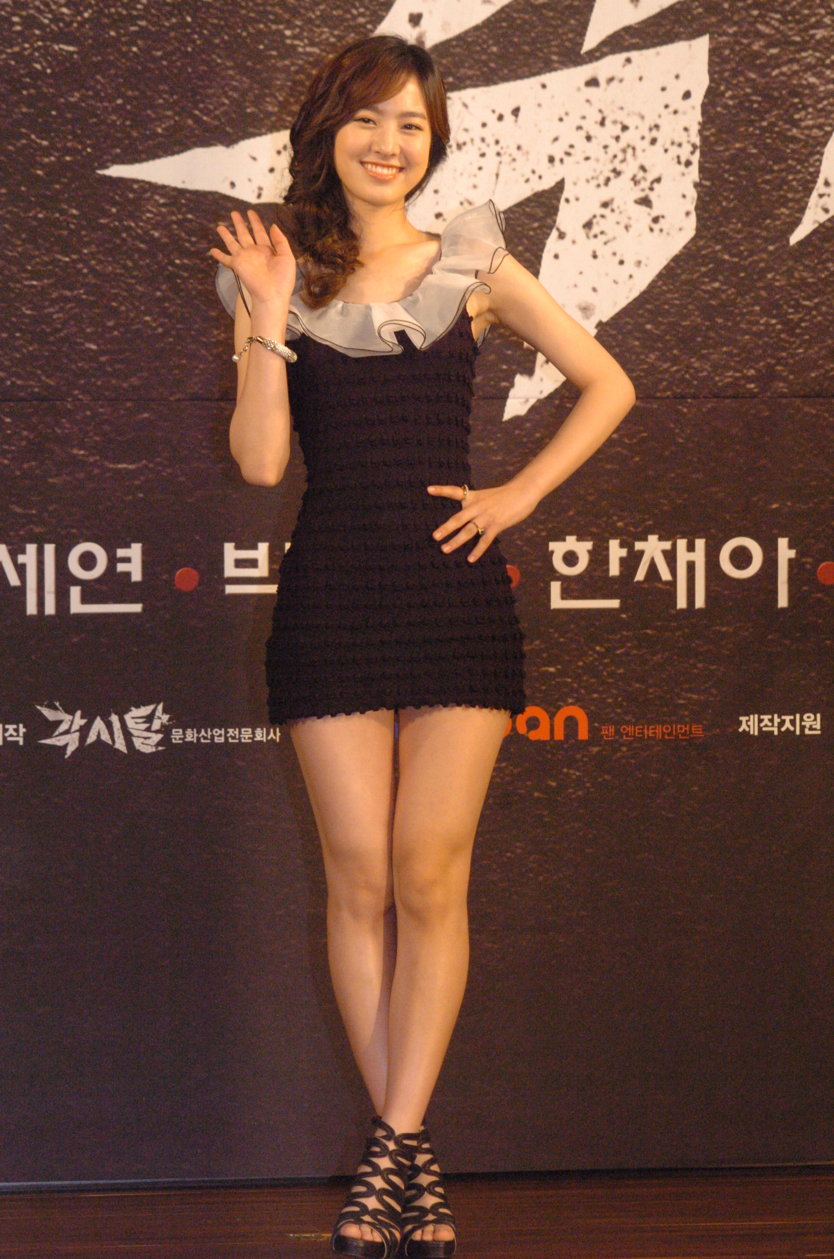 2012년 5월 23일 63컨벤션센터 주니퍼룸에서 열린 KBS2 수목드라마 《각시탈》 제작발표회에서의 진세연.